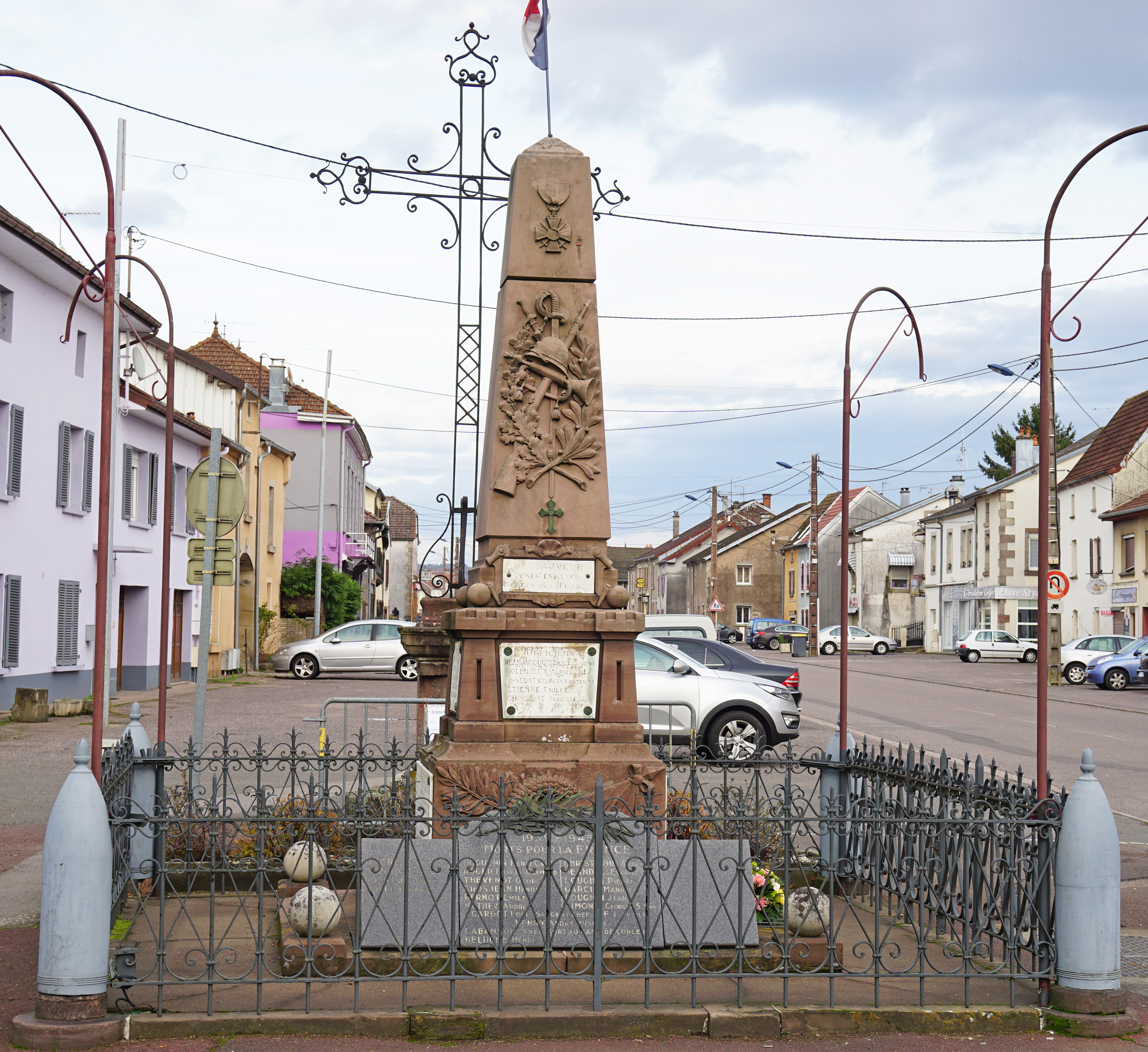 Le monument aux morts de Saint-Sauveur en Haute-Saône.